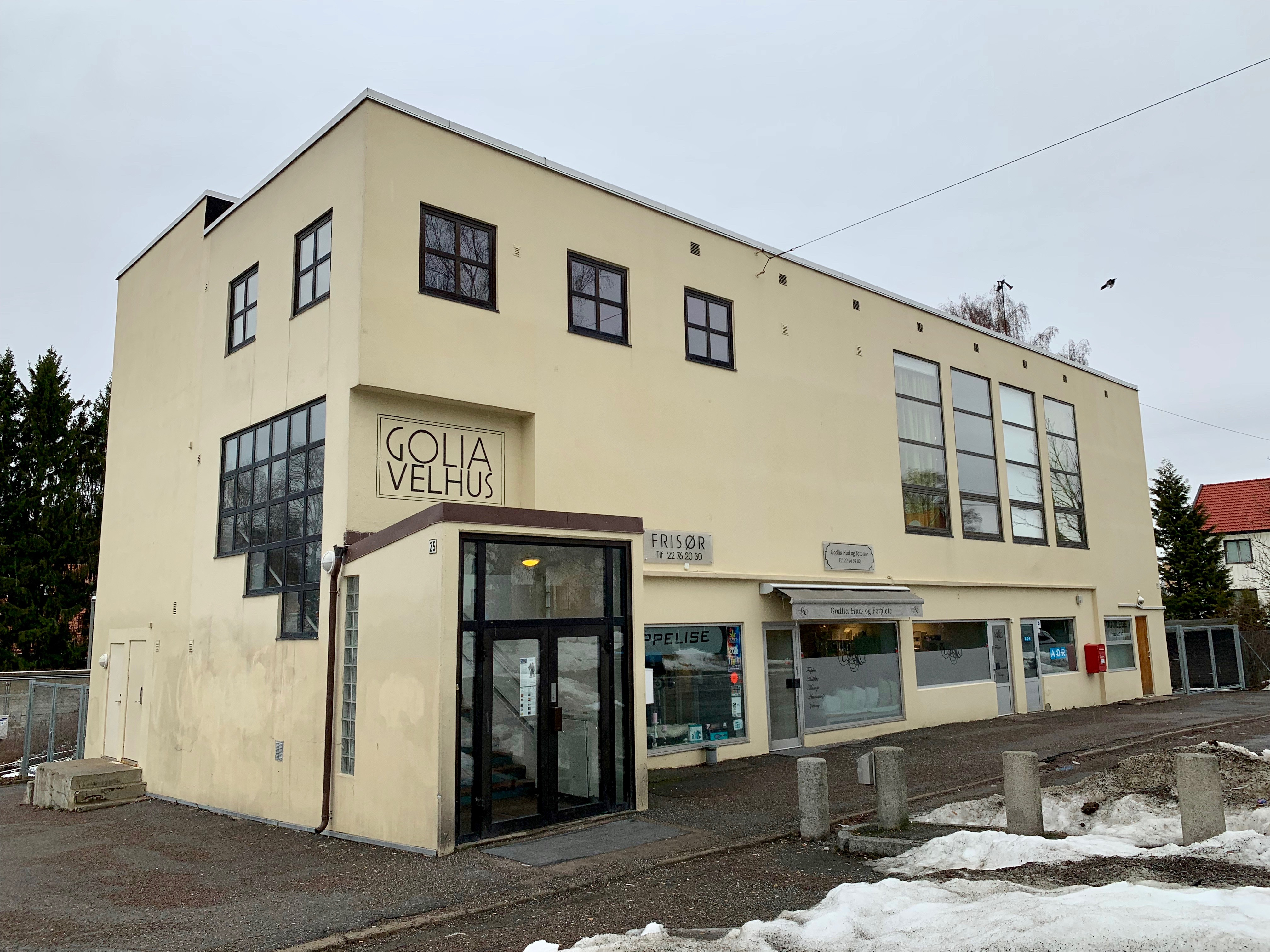 Golia Velhus på Godlia i Oslo.